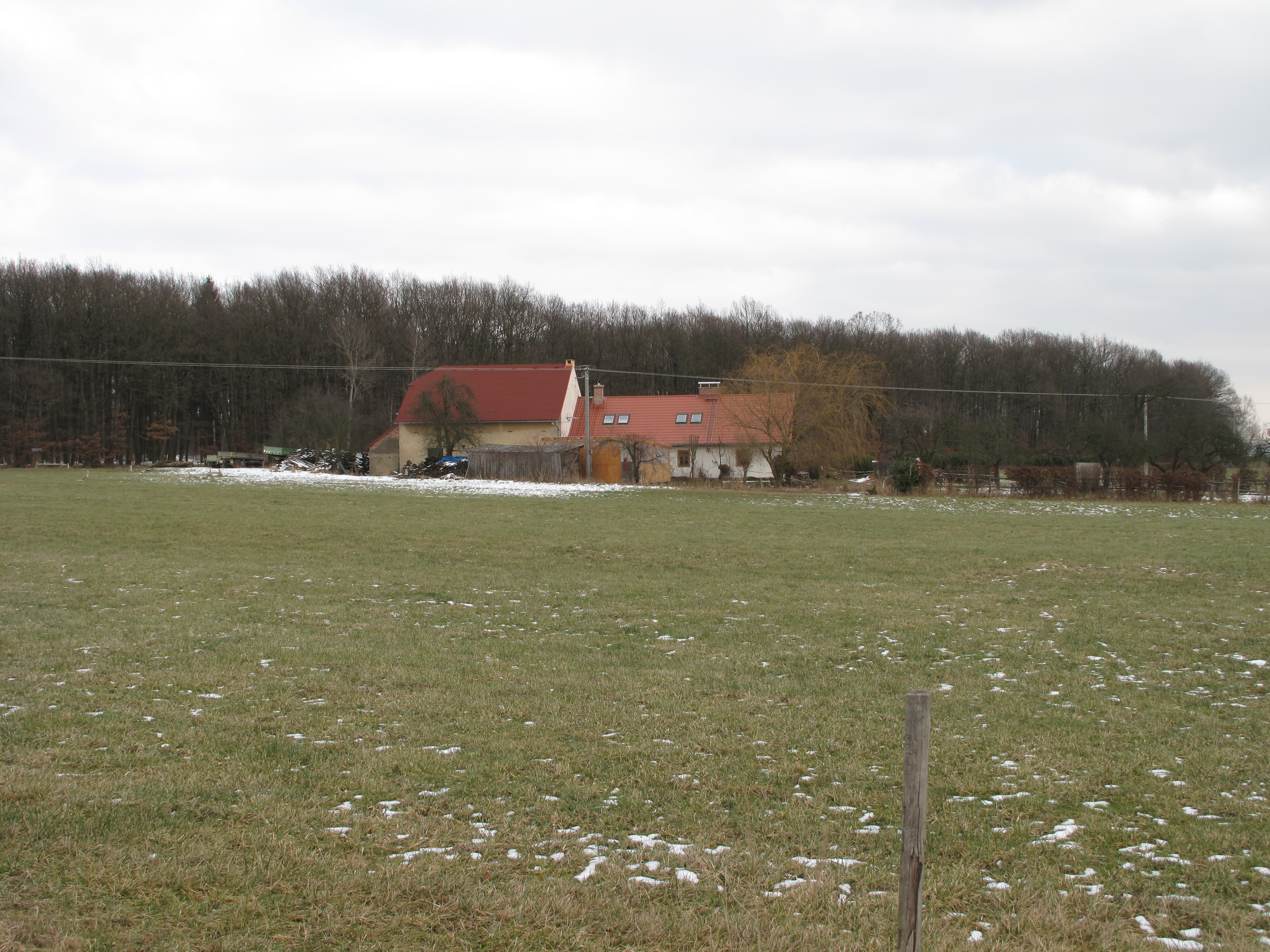 Chalupy v Řehnicích. Okres Mladá Boleslav, Česká republika.